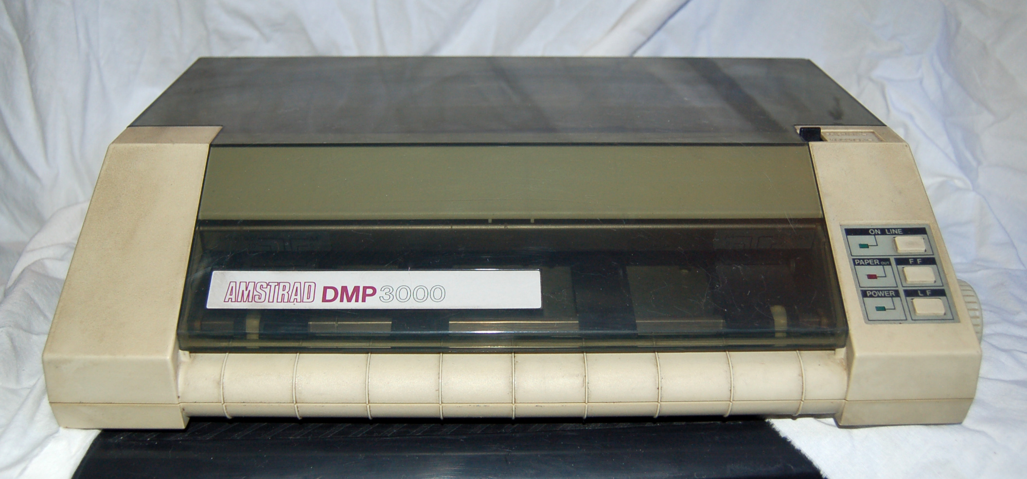 imprimante/printer Amstrad DMP-3000